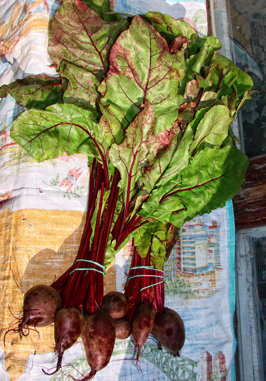 buraczki